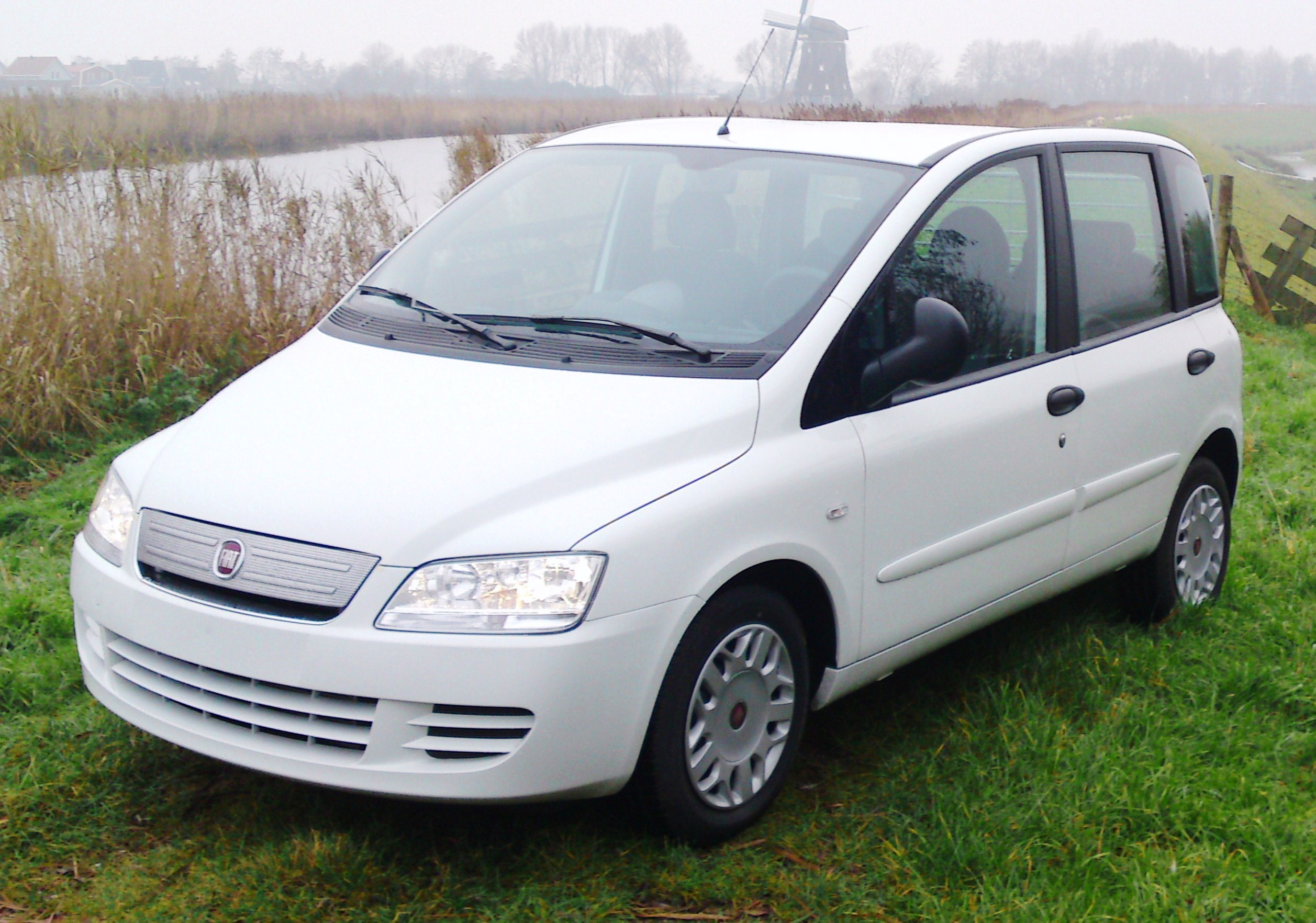 Foto Multipla front